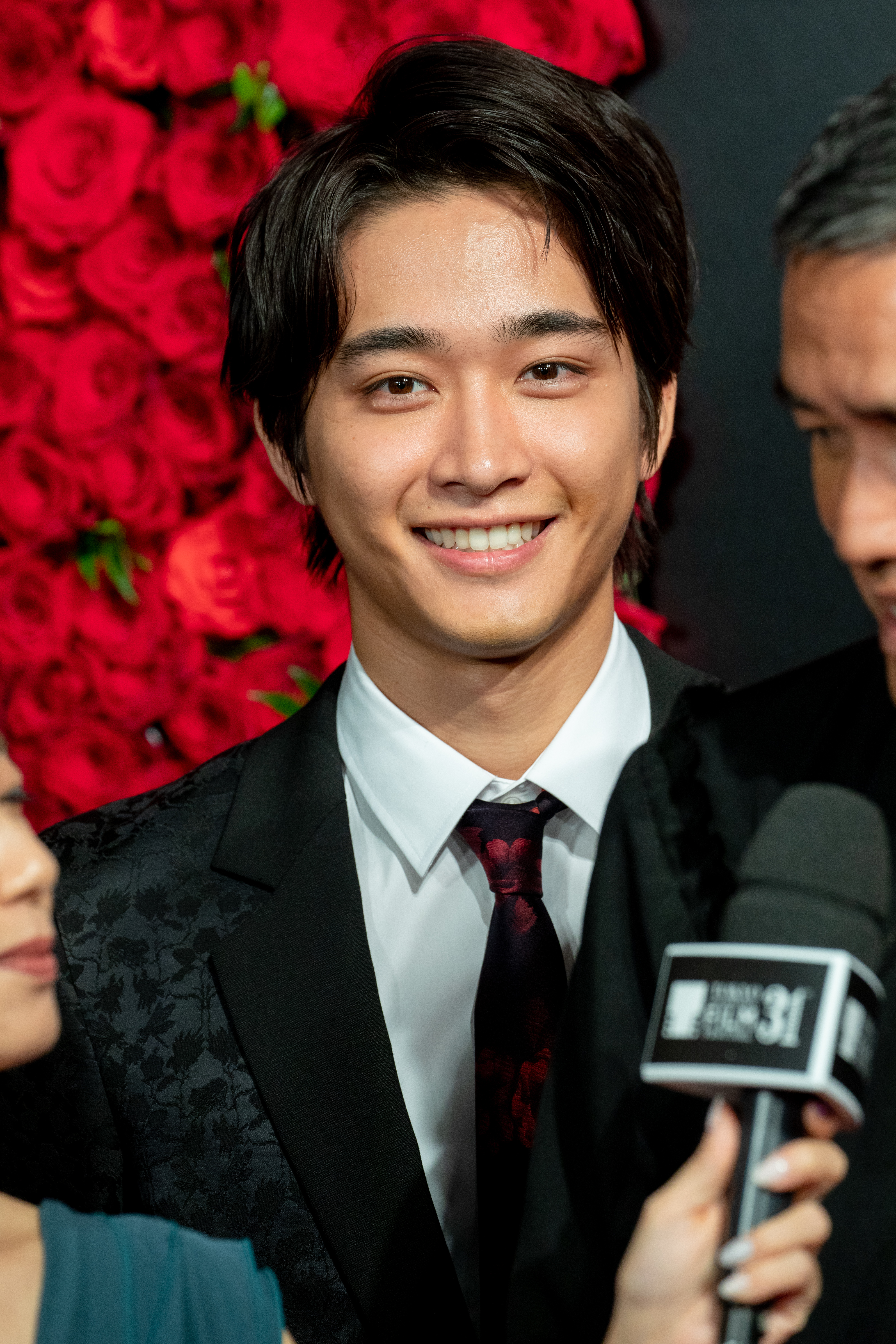 第30回 東京国際映画祭 オープニングセレモニー 佐藤寛太 (jam)